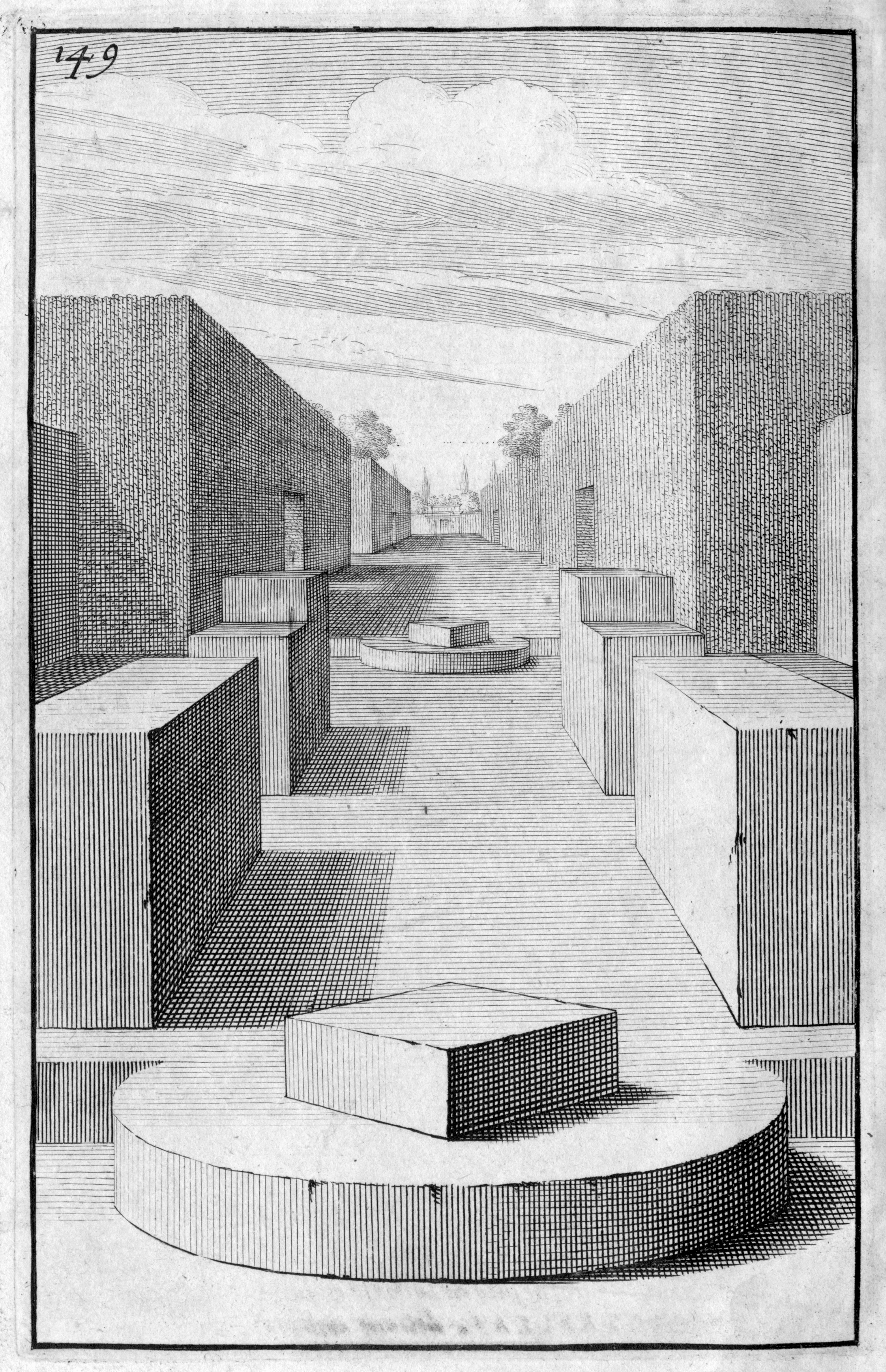 Geometrischer Garten. Kupferstiche, aus: Abraham Bosse, Maniere universelle de M. Desargues pour praticquer la Perspective, Paris 1647. Darmstadt, Hessische Landes- und Hochschulbibliothek